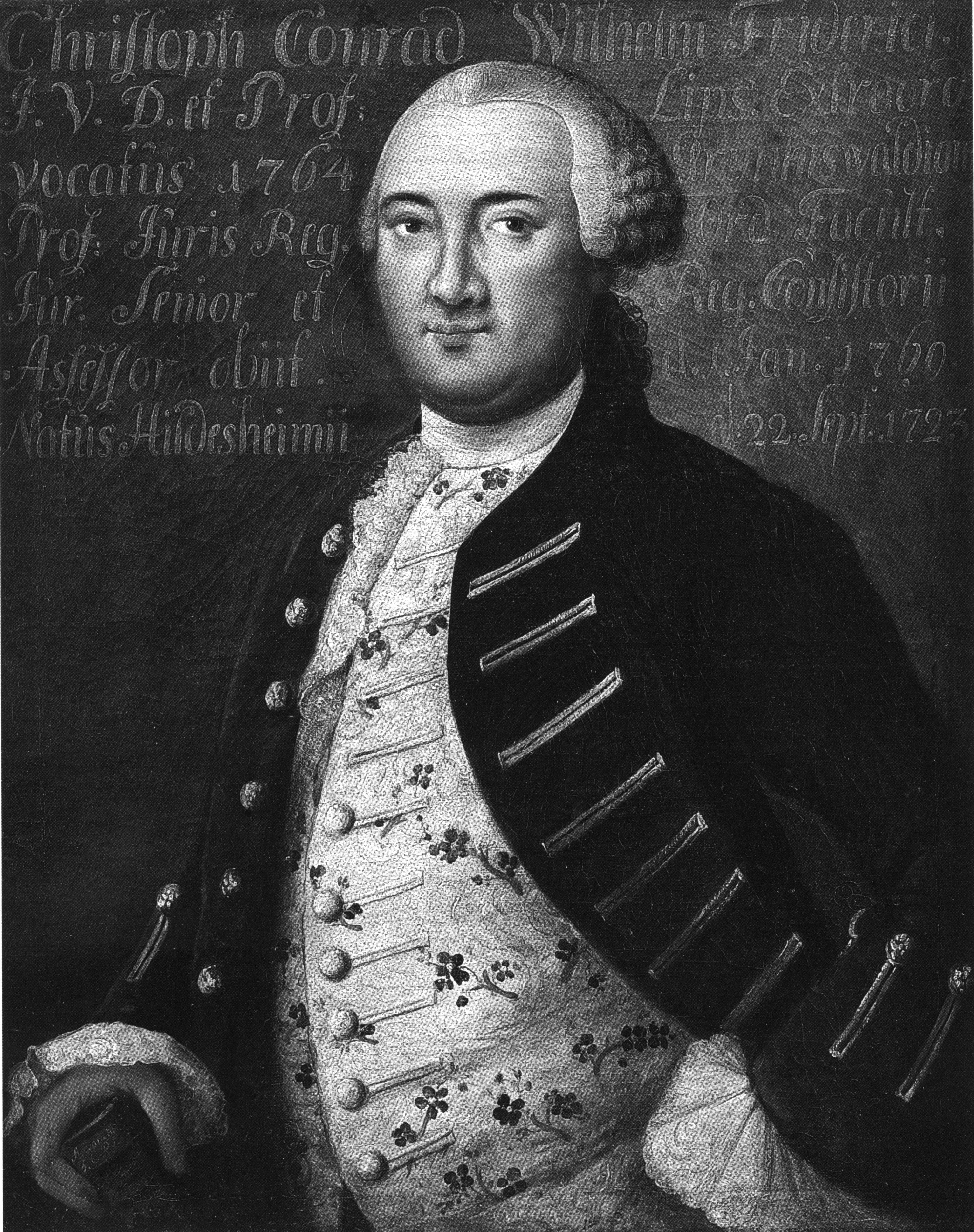 Christoph Konrad Wilhelm Friderici (1727–1769)